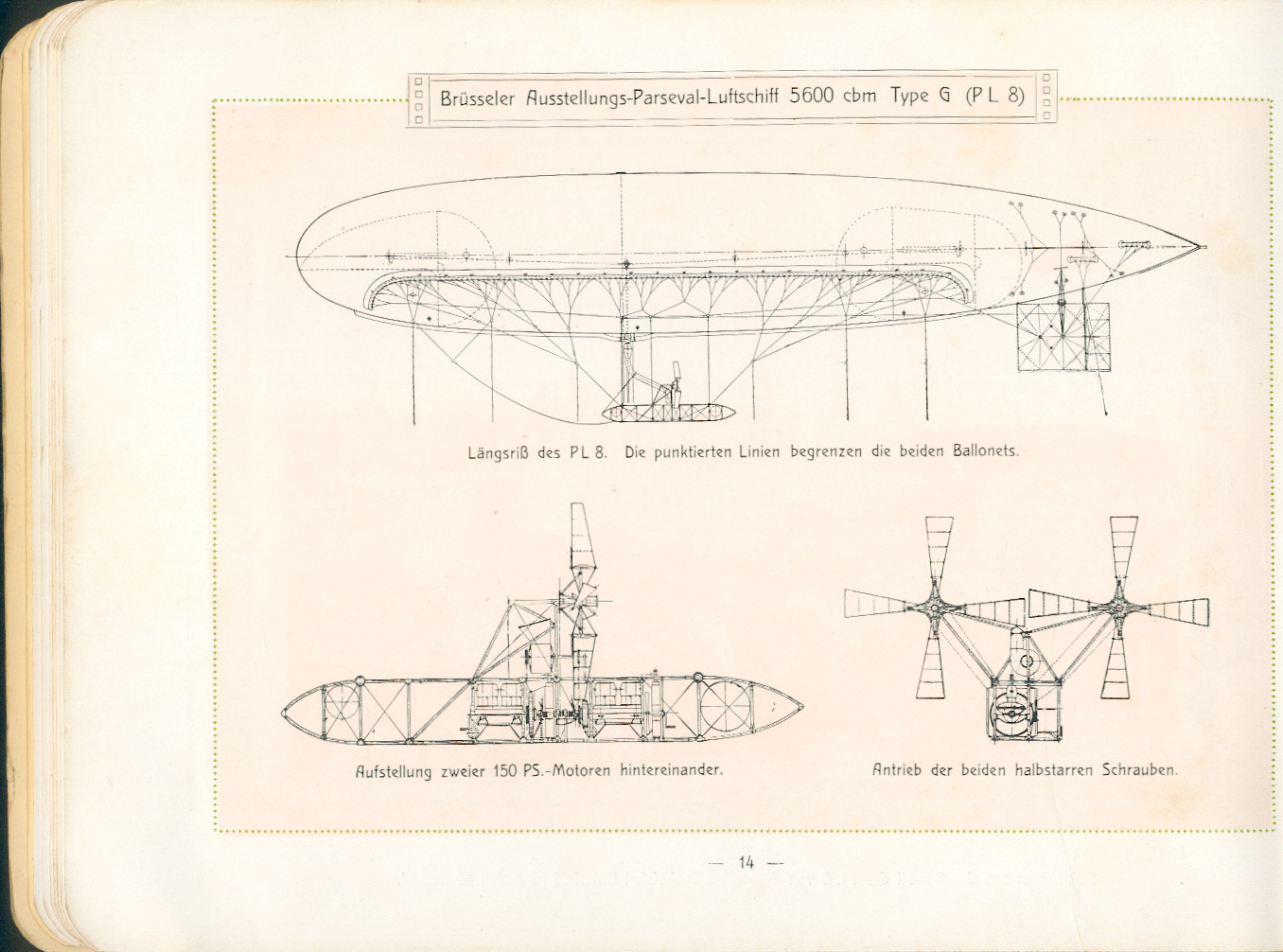 Parseval-Luftschiff PL8 Zeichnung